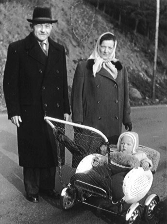 Historický kočárek - datováno jaro 1959.